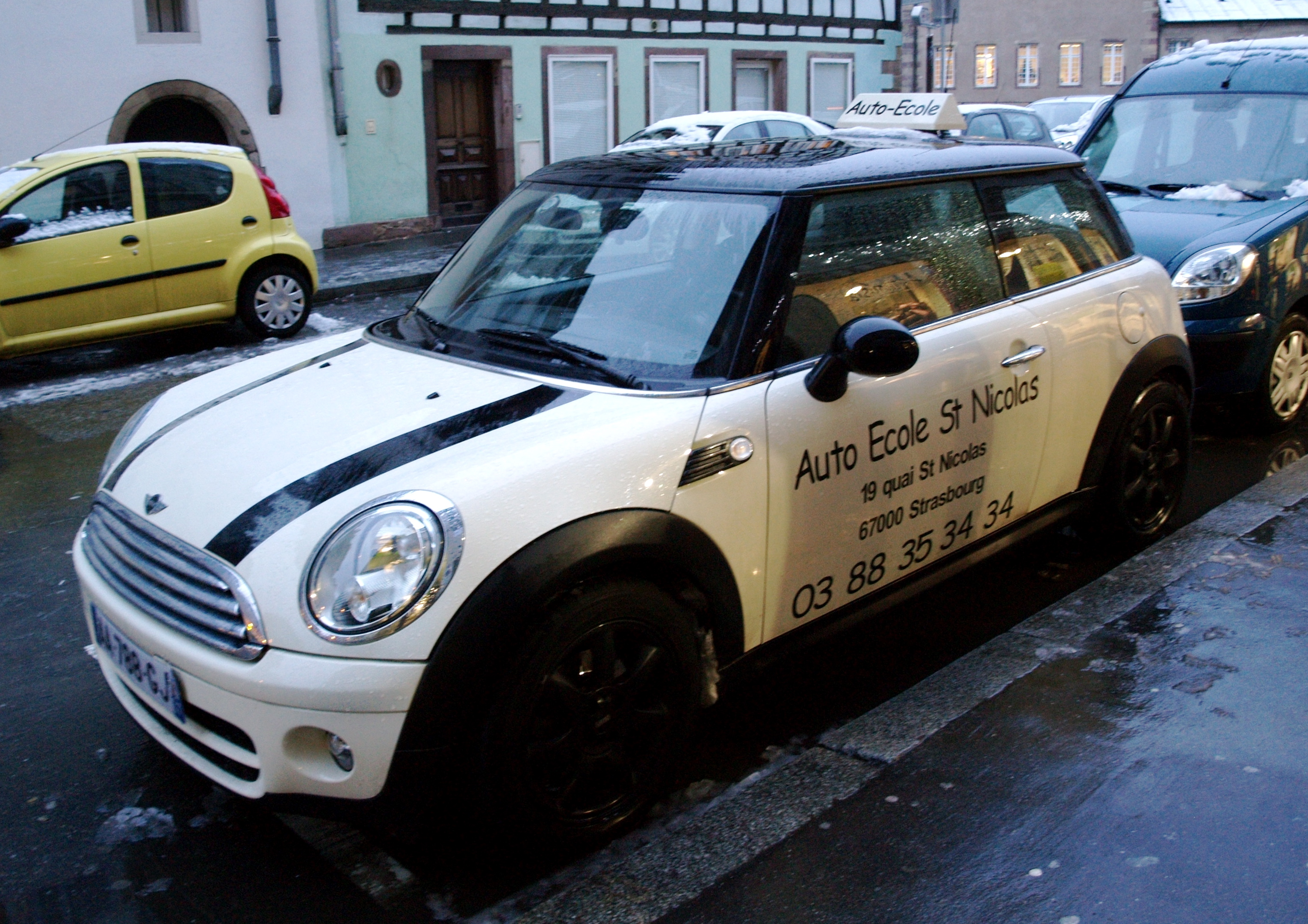 Une Mini d'auto-école à Strasbourg